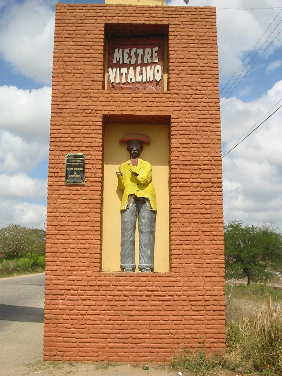 Caruaru (Pernambuco), Brasil. Imagem de Mestre Vitalino na entrada do Alto do Moura. Caruaru (Pernambuco), Brazil. Mestre Vitalino statue.